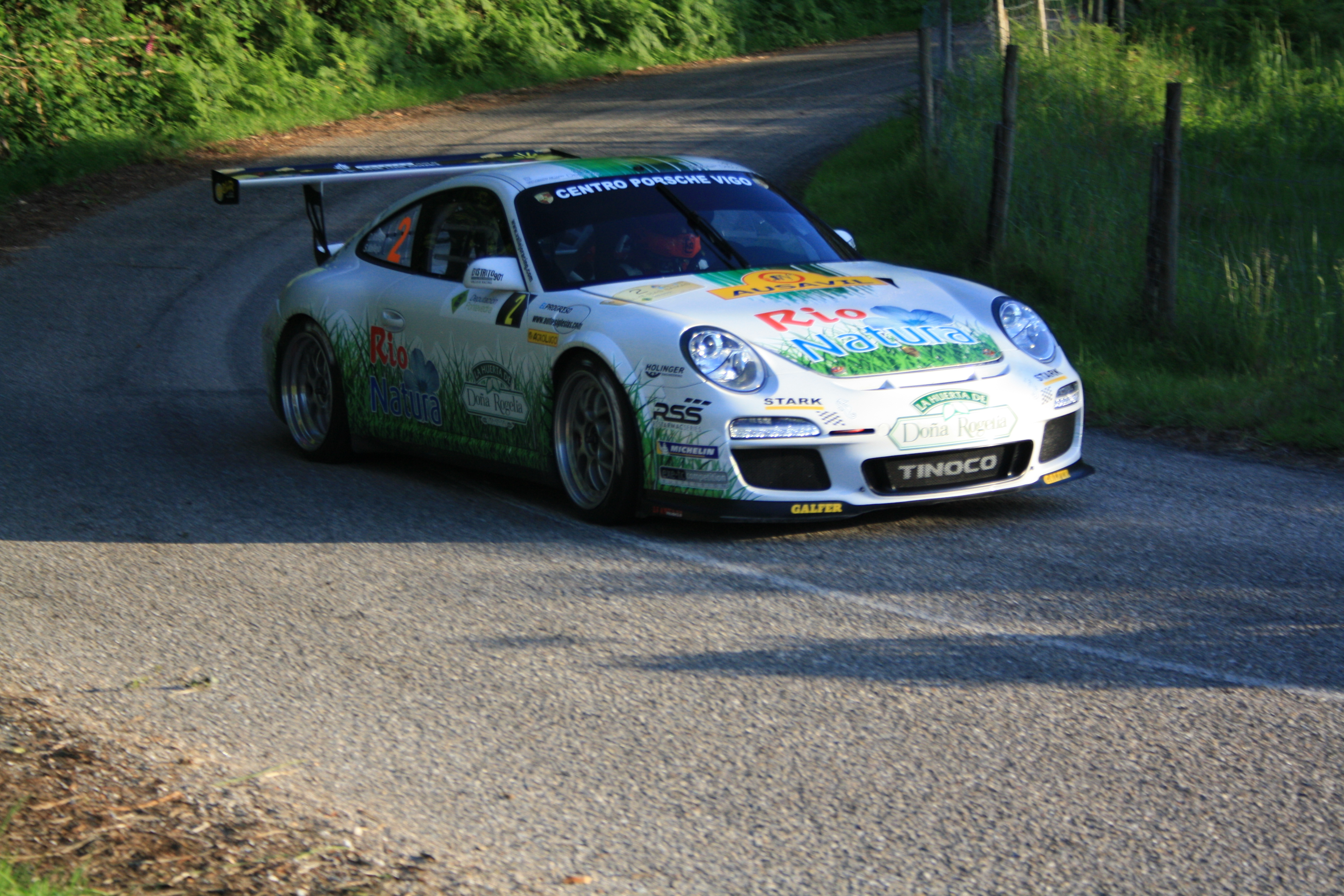 Tramo Chenlo